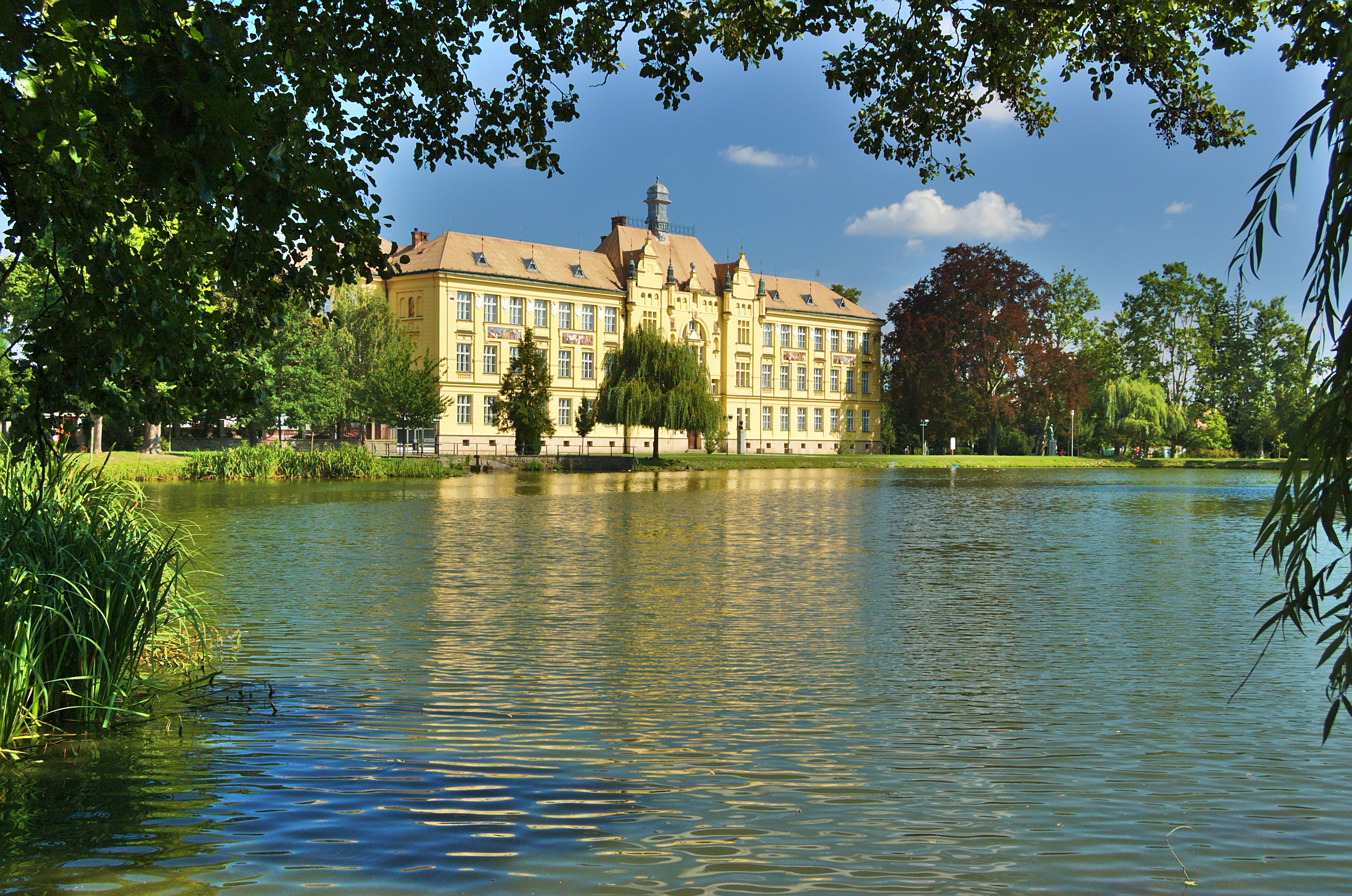 Gymnázium Jana Opletala, Litovel, okres Olomouc